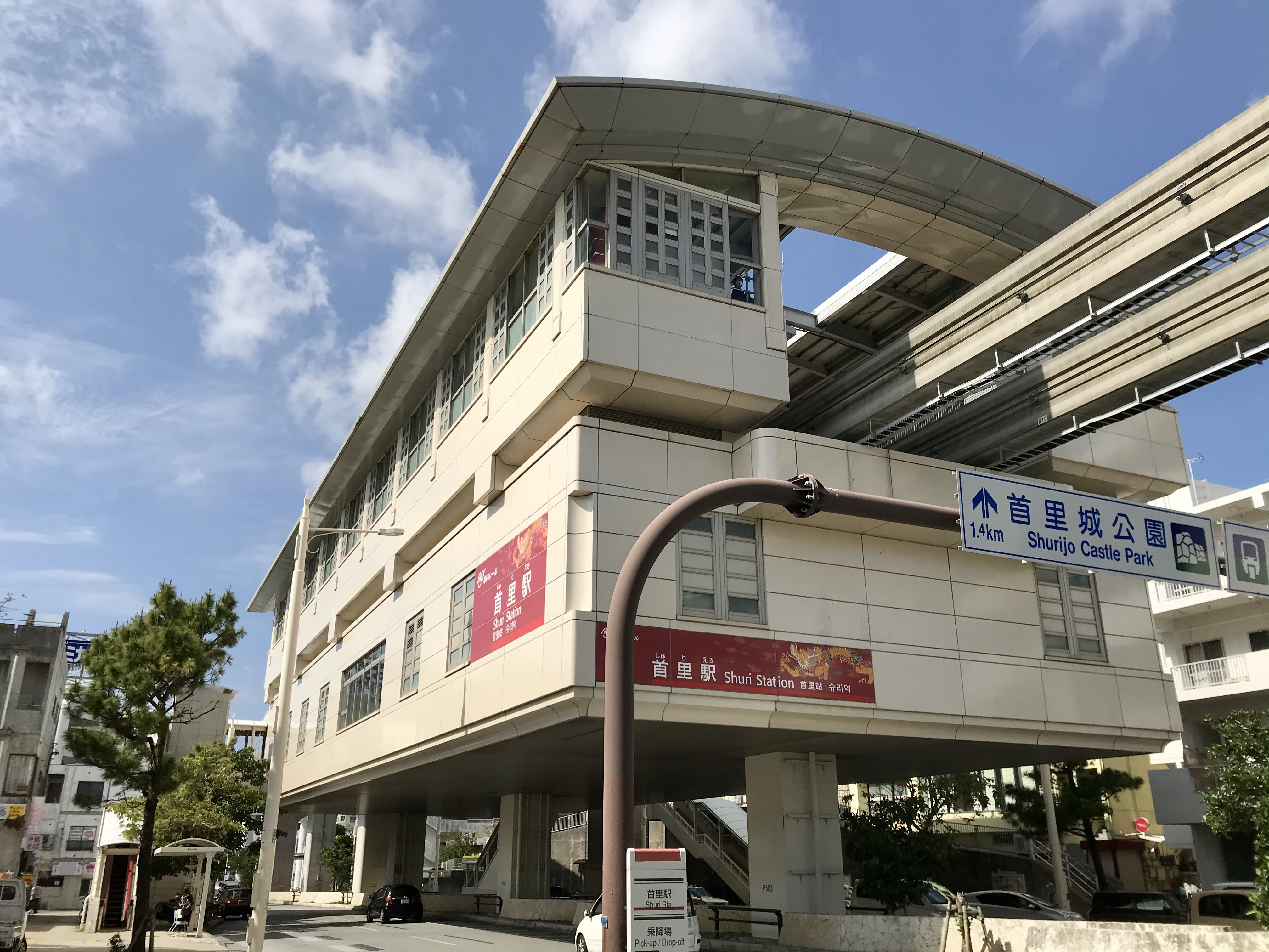 沖縄都市モノレール（ゆいレール）首里駅